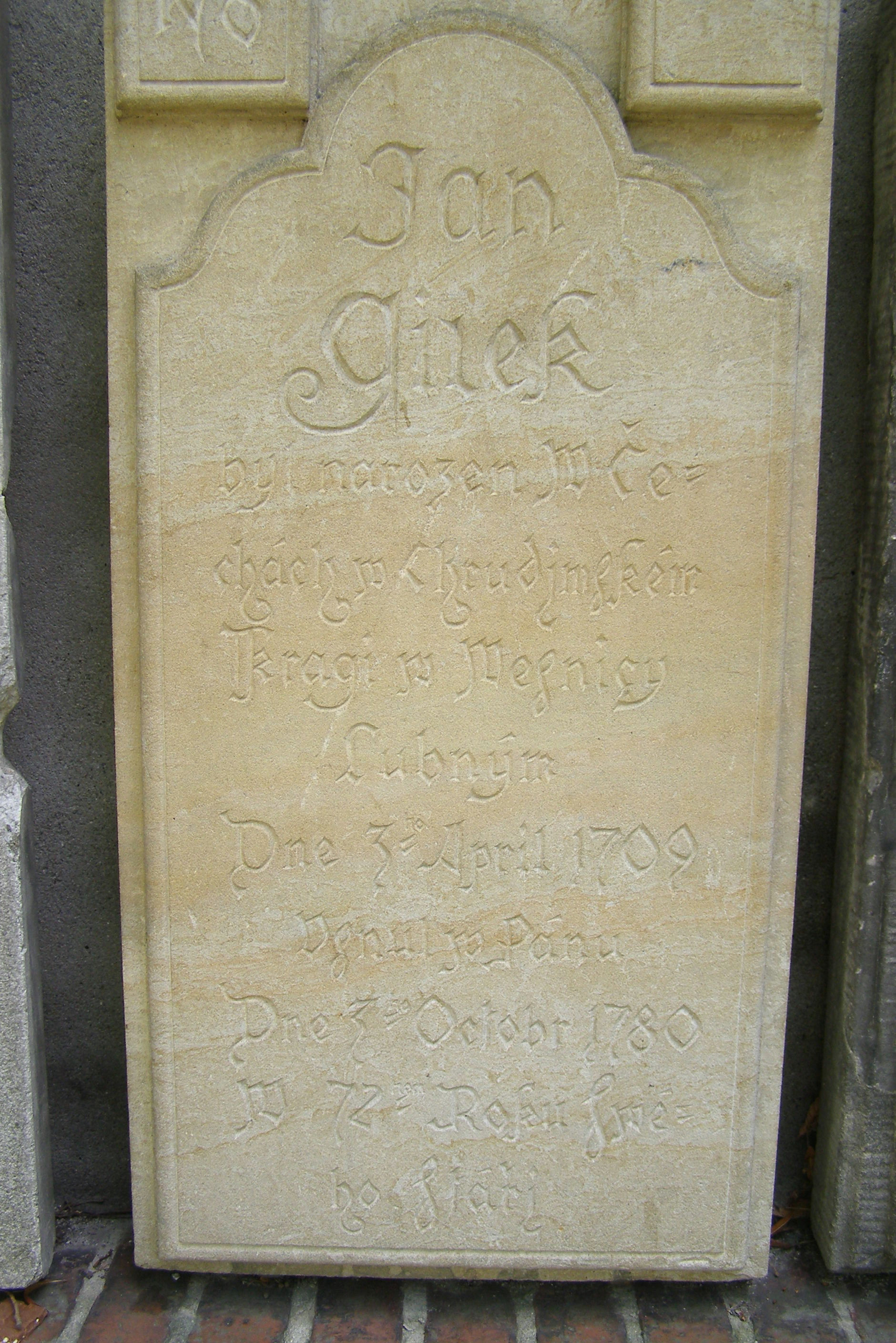 Berlin, Böhmisch-Rixdorf, Böhmisches Gottesacker, Grabstein Jan Jílek (1780) Berlin, Bohemian Rixdorf, Bohemian Cemetery, gravesstone of Jan Jílek (1780) Berlín, Český Rixdorf, Český hřbitov, náhrobní kámen Jana Jílka (z r. 1780)